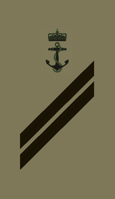 OR3 NOR - Seniorvisekonstabel NY